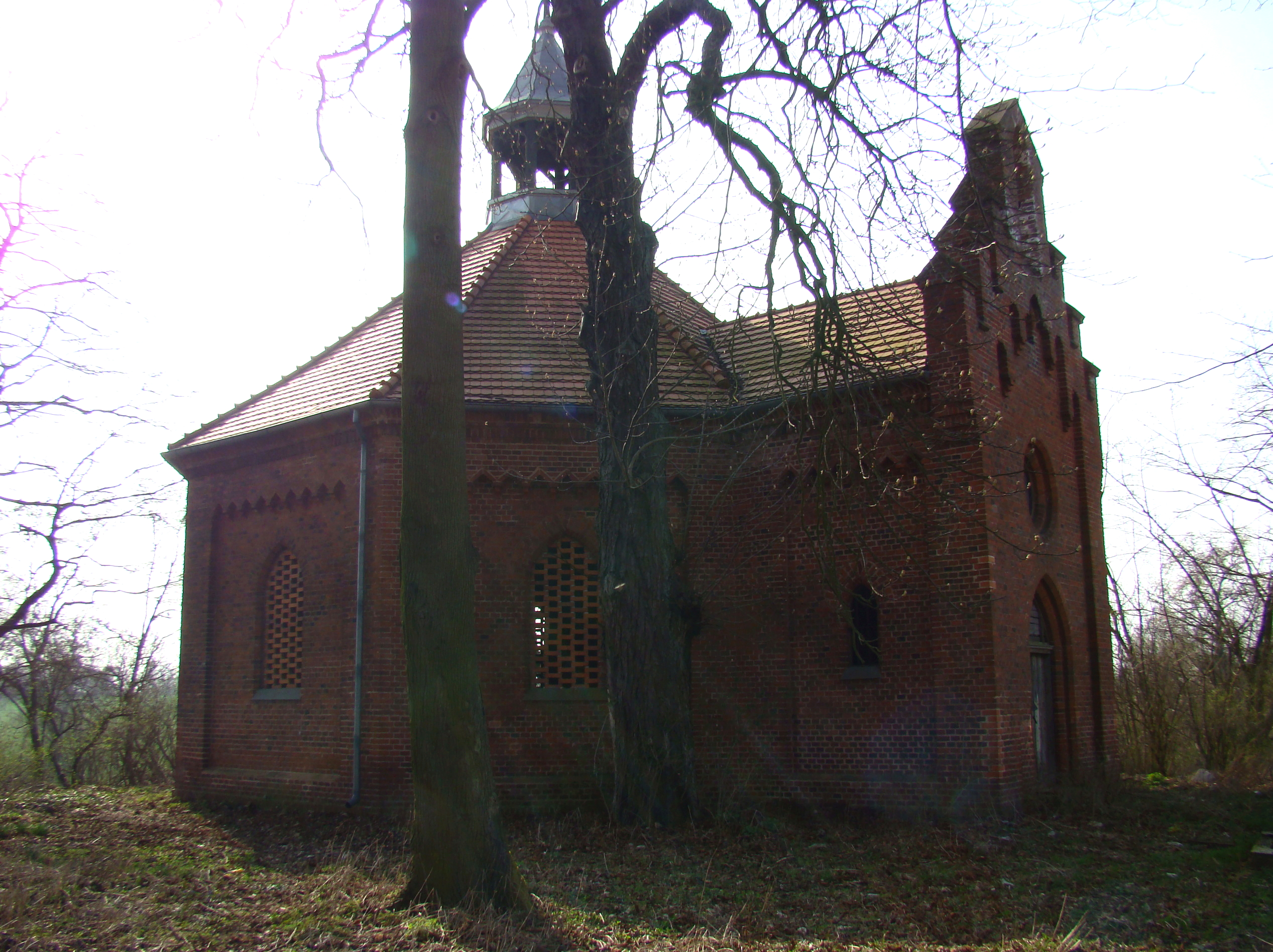 Kościół ewangelicki, Orzeszkowo, 1861 r.